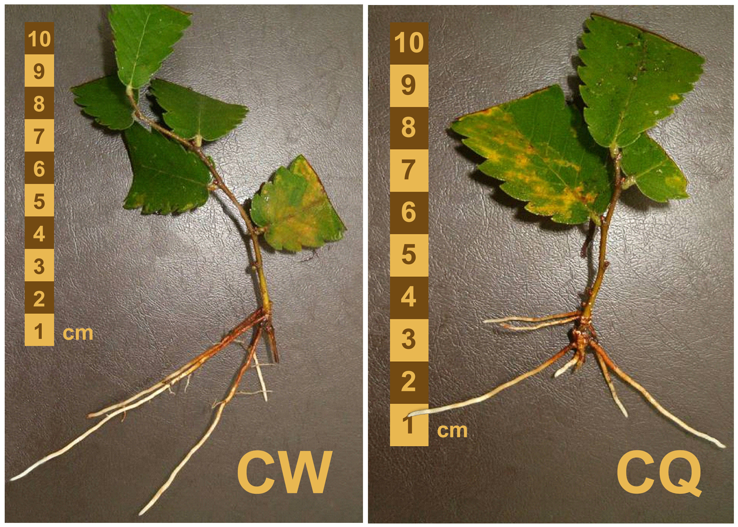 Ожиљенице кавкаске зелкове, Арборетум, Београд (аутор: Зоран Рацић).